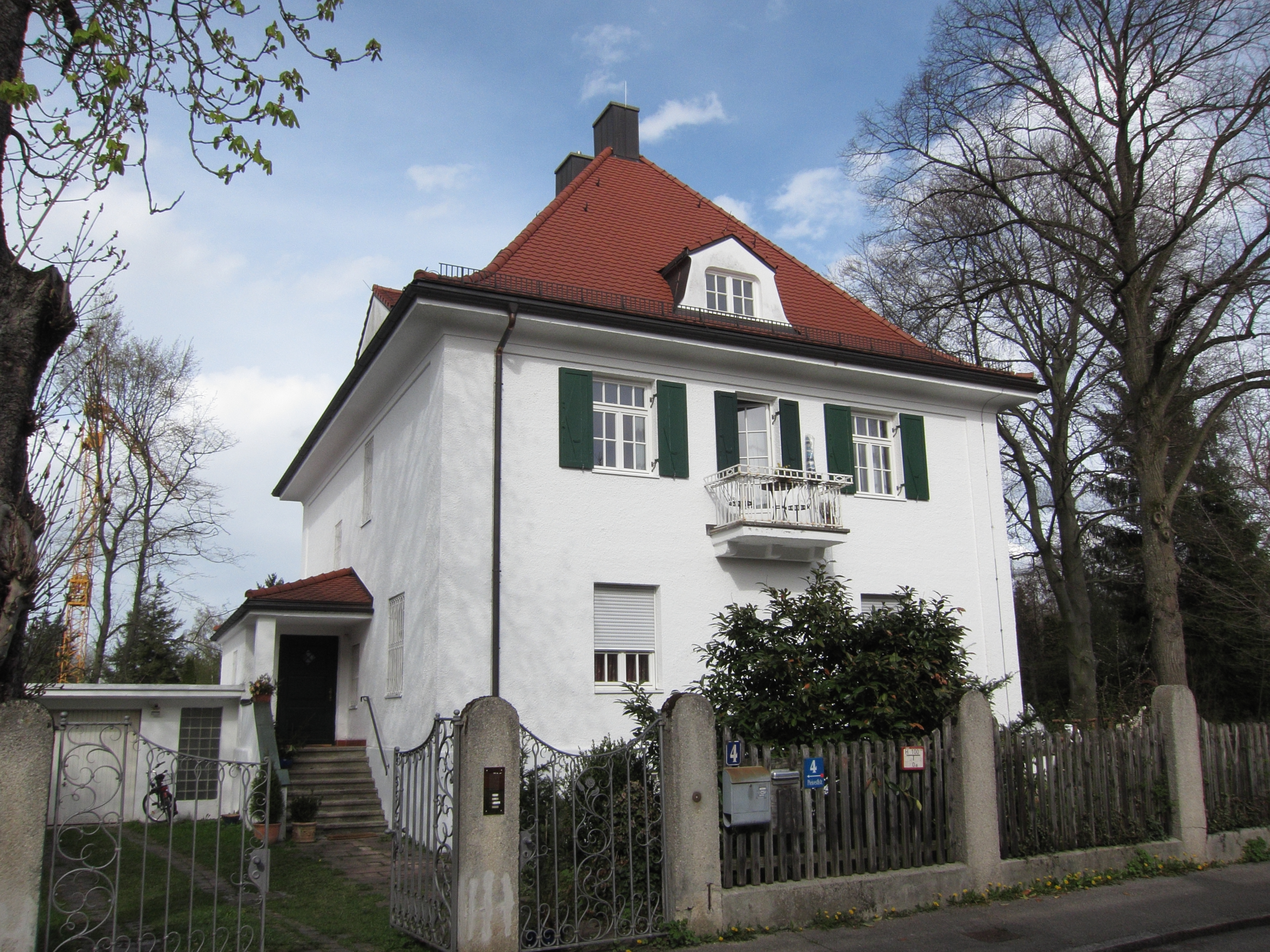 Pfeivestlstraße 4; Villa, mit Walmdach, barockisierend, 1910 von Paul Böhmer.